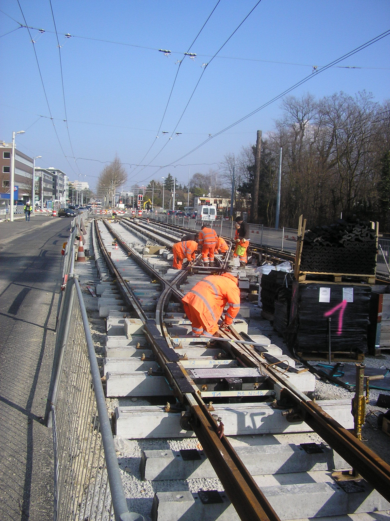 Chantier du tram "TCOB", à Onex, Genève, février 2011